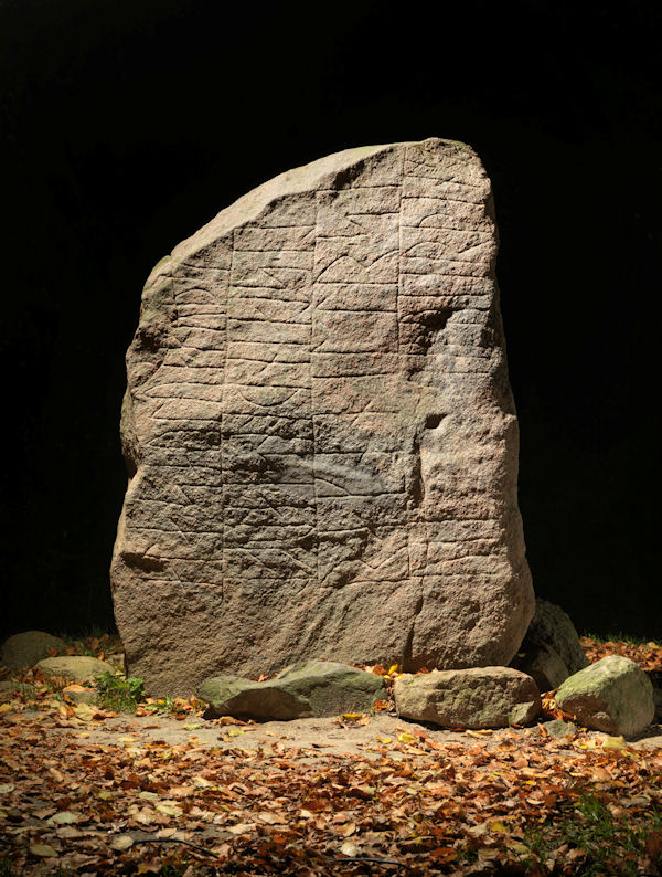 Foto af Roberto Fortuna